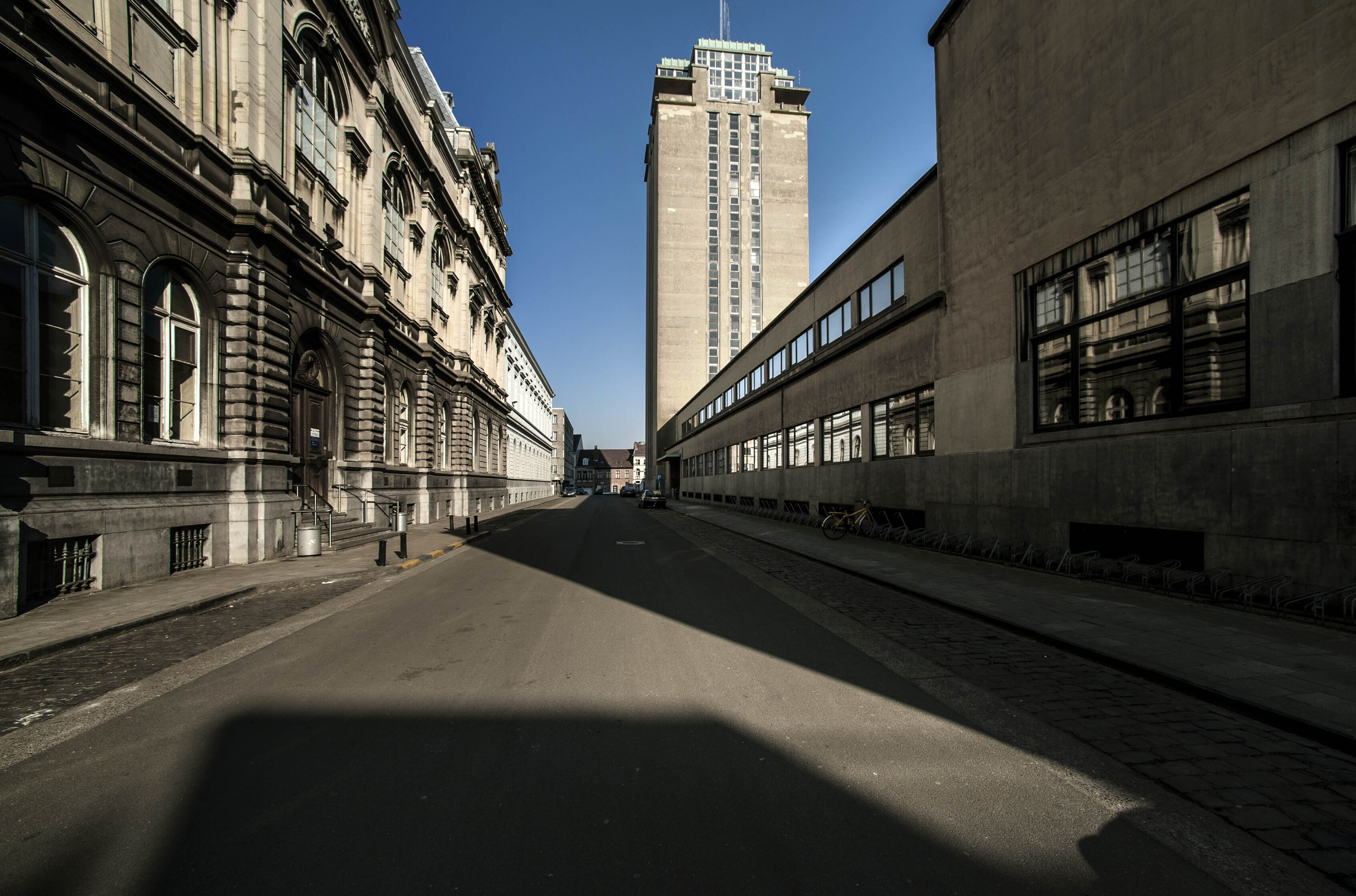 Boekentoren UGent, zicht vanuit de Rozier